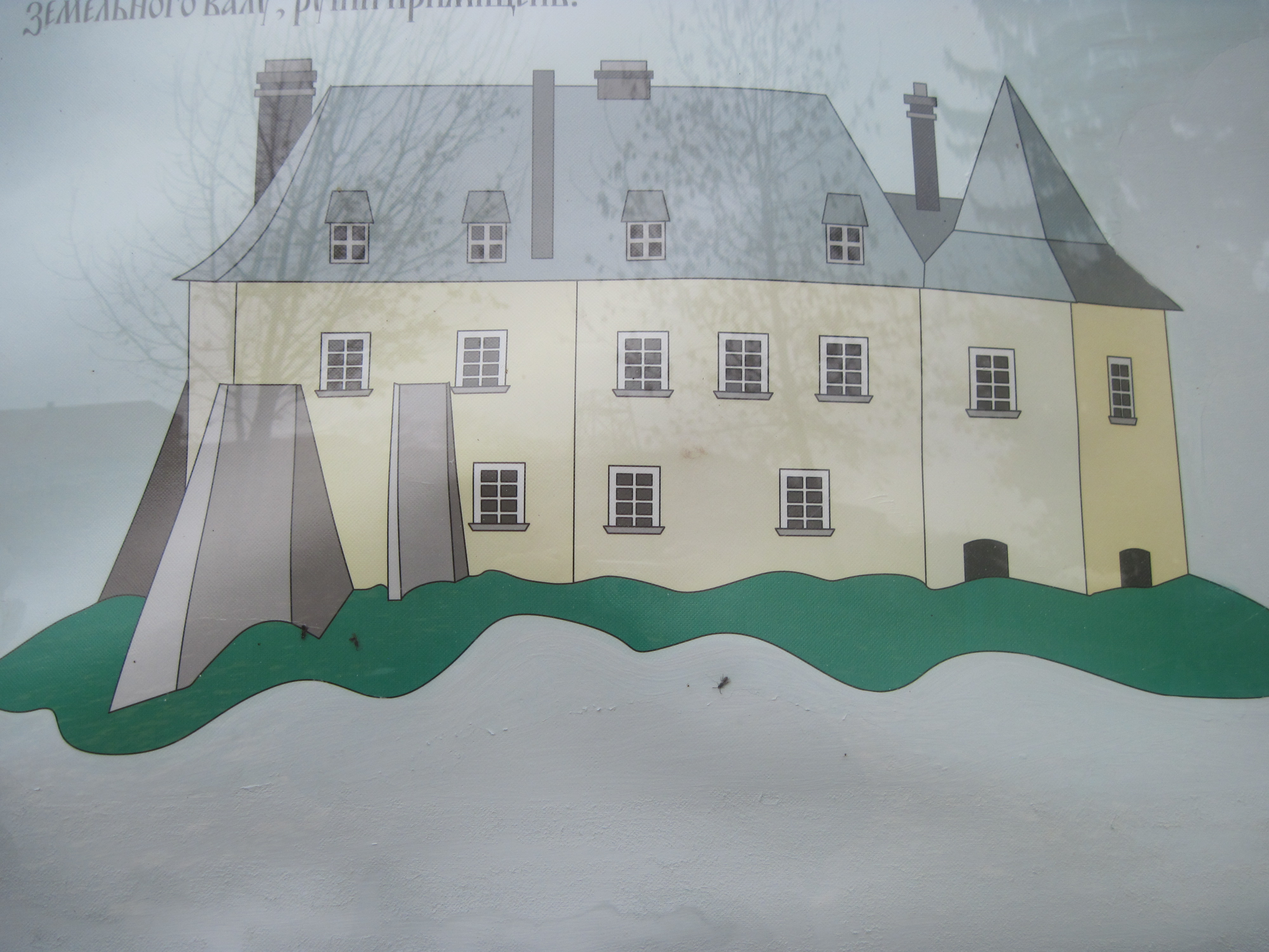 Макет житла Підзамоцького замку